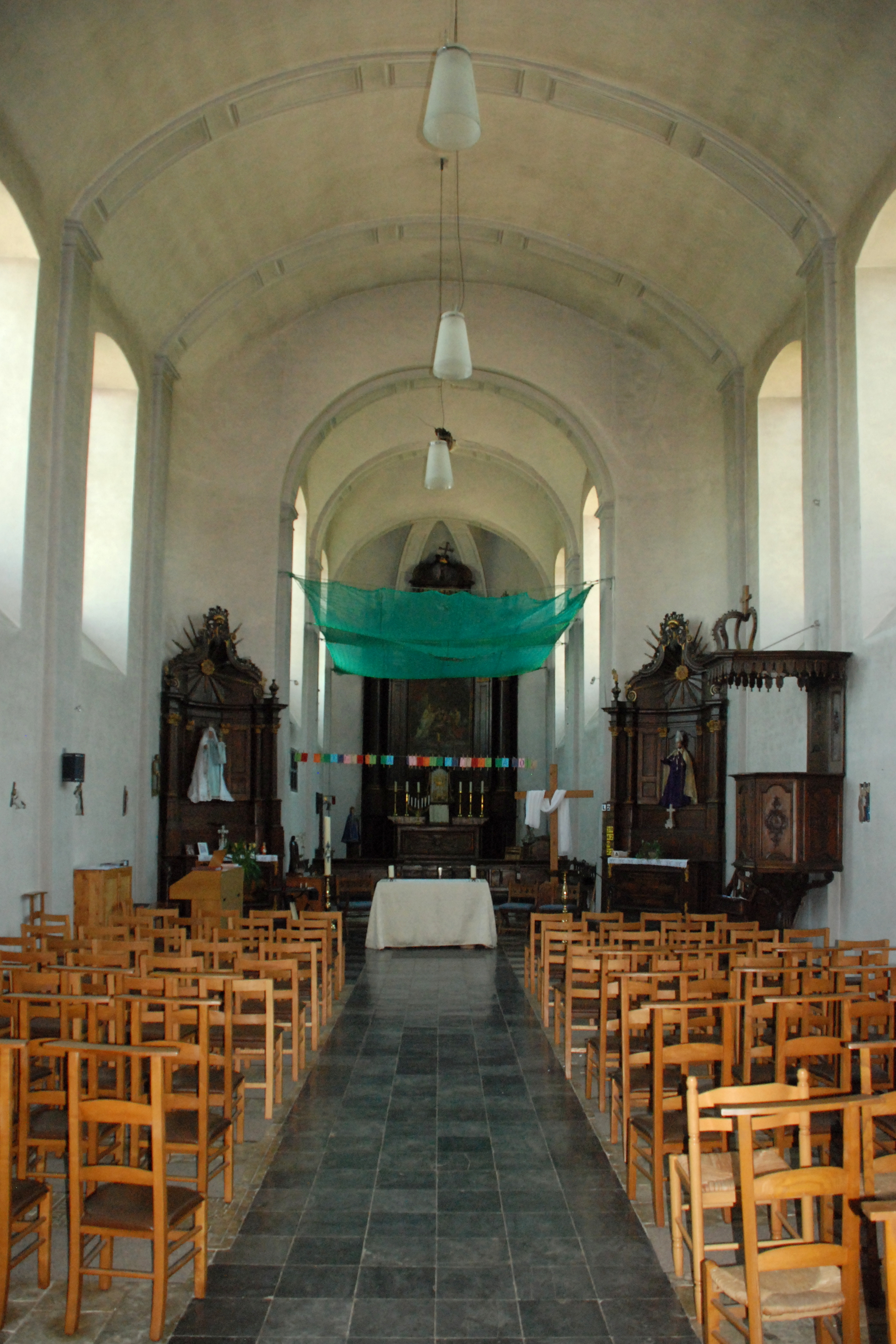 Belgique - Brabant wallon - Jodoigne - Saint-Remy-Geest - Église Saint-Remy